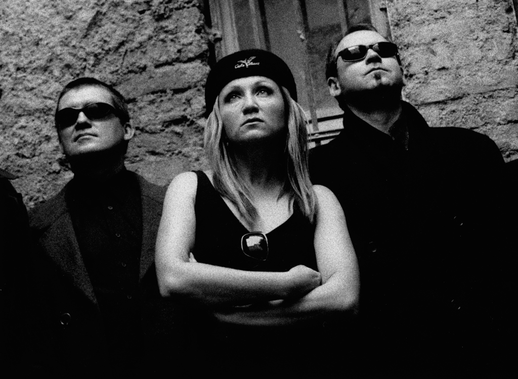 Tereza z Davle, fotografické dílo Bára Basiková a Precedens